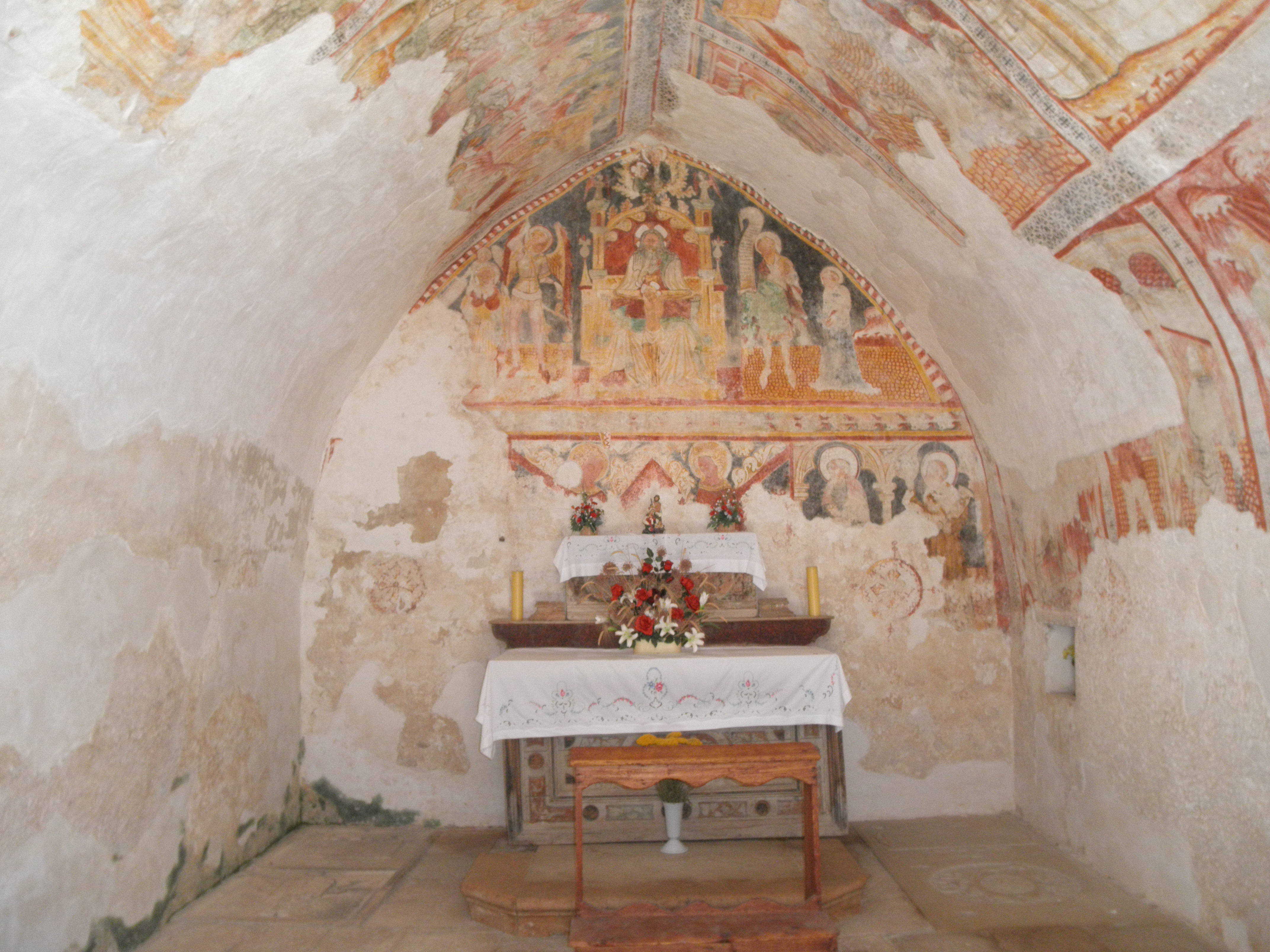 Interno de historia kapelo Santo Spirito en Bale - Valle